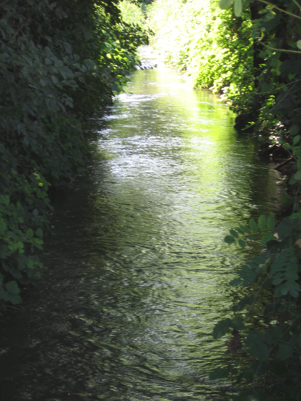 Fosso bergamasco a Pontirolo Nuovo